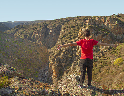 Vistas de las arribes del Huebra desde el mirador del Huebra, en Saldeana, Castilla y León, España